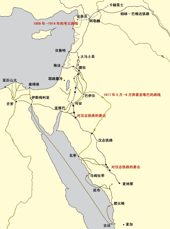 １＝阿拉伯的劳伦斯在阿拉伯的历程，1909年-1918年。由维基人kallgan创作于2003年12月12日。